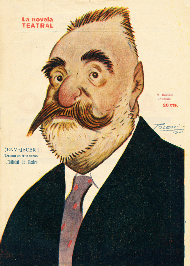 Miguel Ramos Carrión.